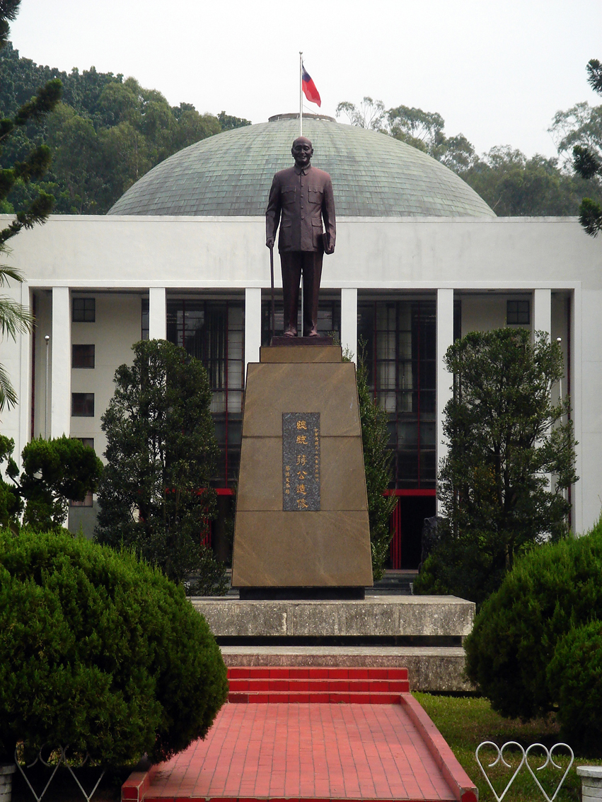 臺灣省議會議事大樓蔣中正站像。